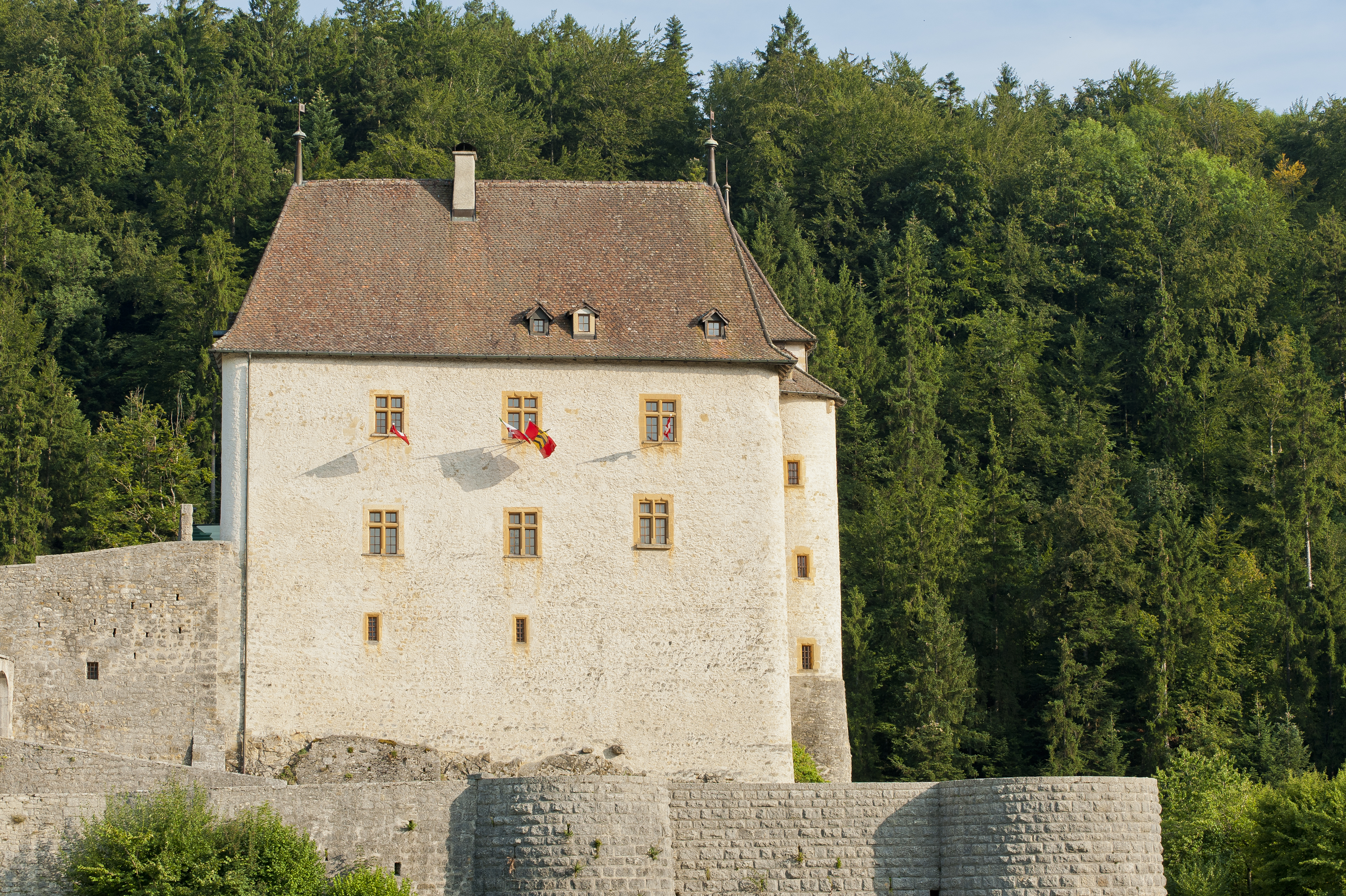 Valangin, Château de Valangin